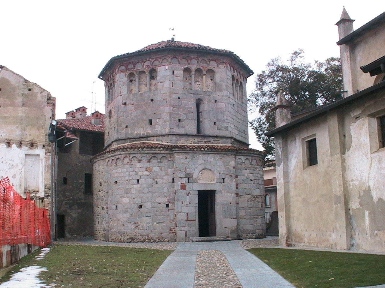 autore RBell 17:35, 9 apr 2007 (CEST) - Marzo 2004